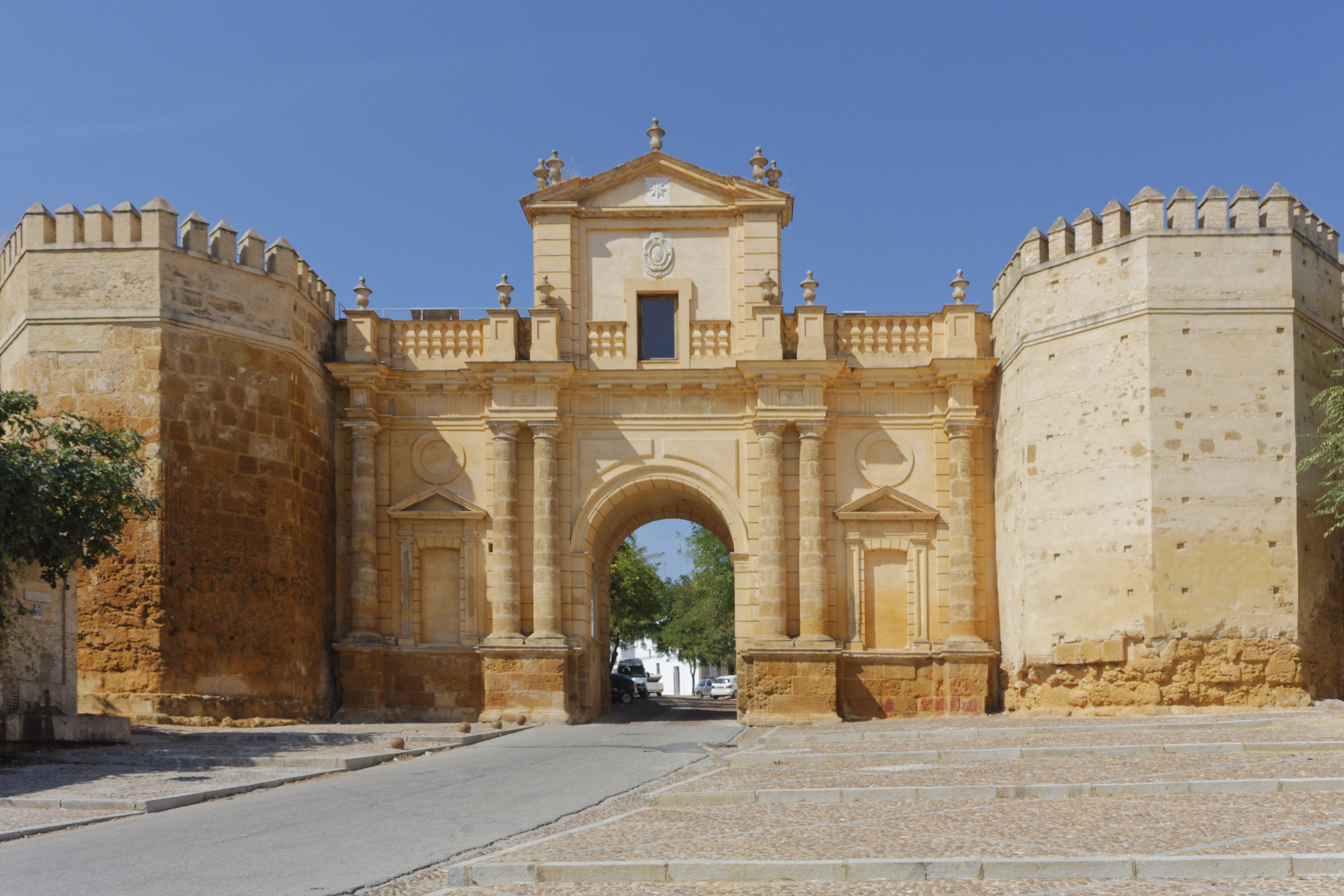 Gate to Cordoba.